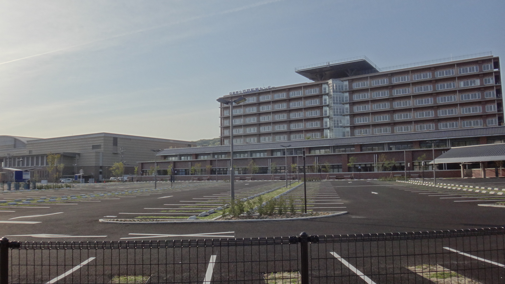 兵庫県洲本市にある兵庫県立淡路医療センター、左隣は洲本市文化体育館（洲本バスセンター前から撮影）